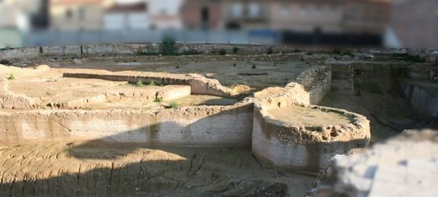 Vista frontal del lienzo de muralla de Molina de Segura (Región de Murcia).